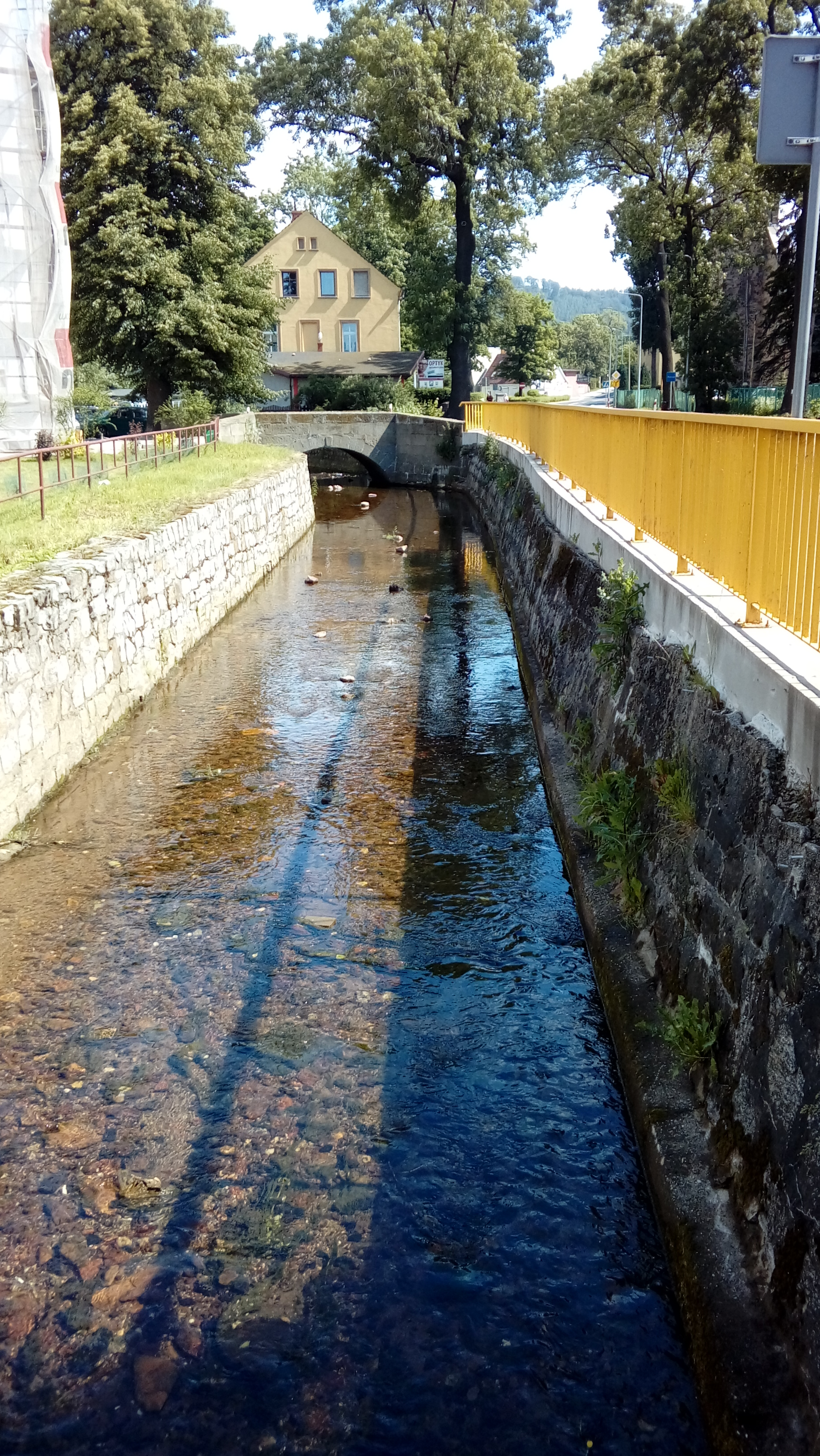 Lubawka, potok Czarnuszka